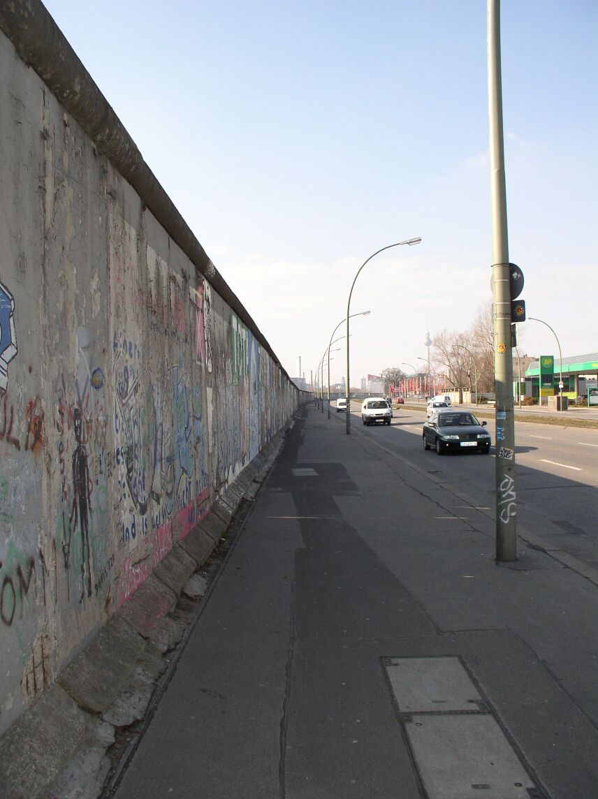 East Side Gallery, Berlin